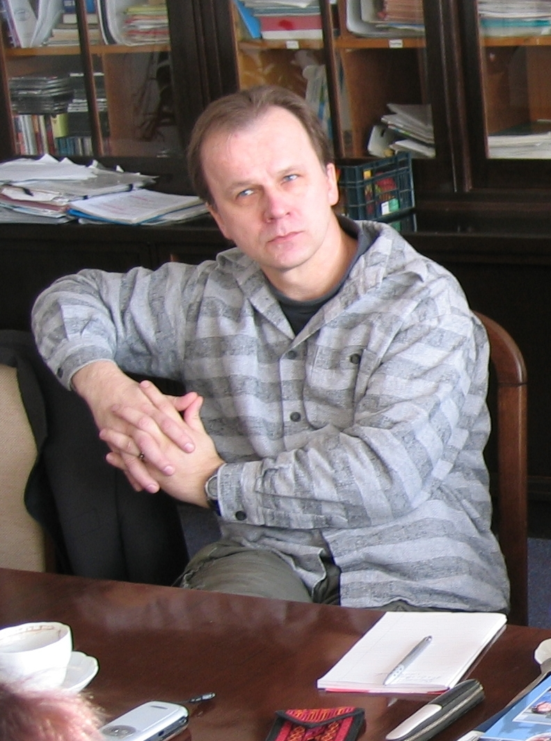 Josef Horehleď 7. ledna 2009